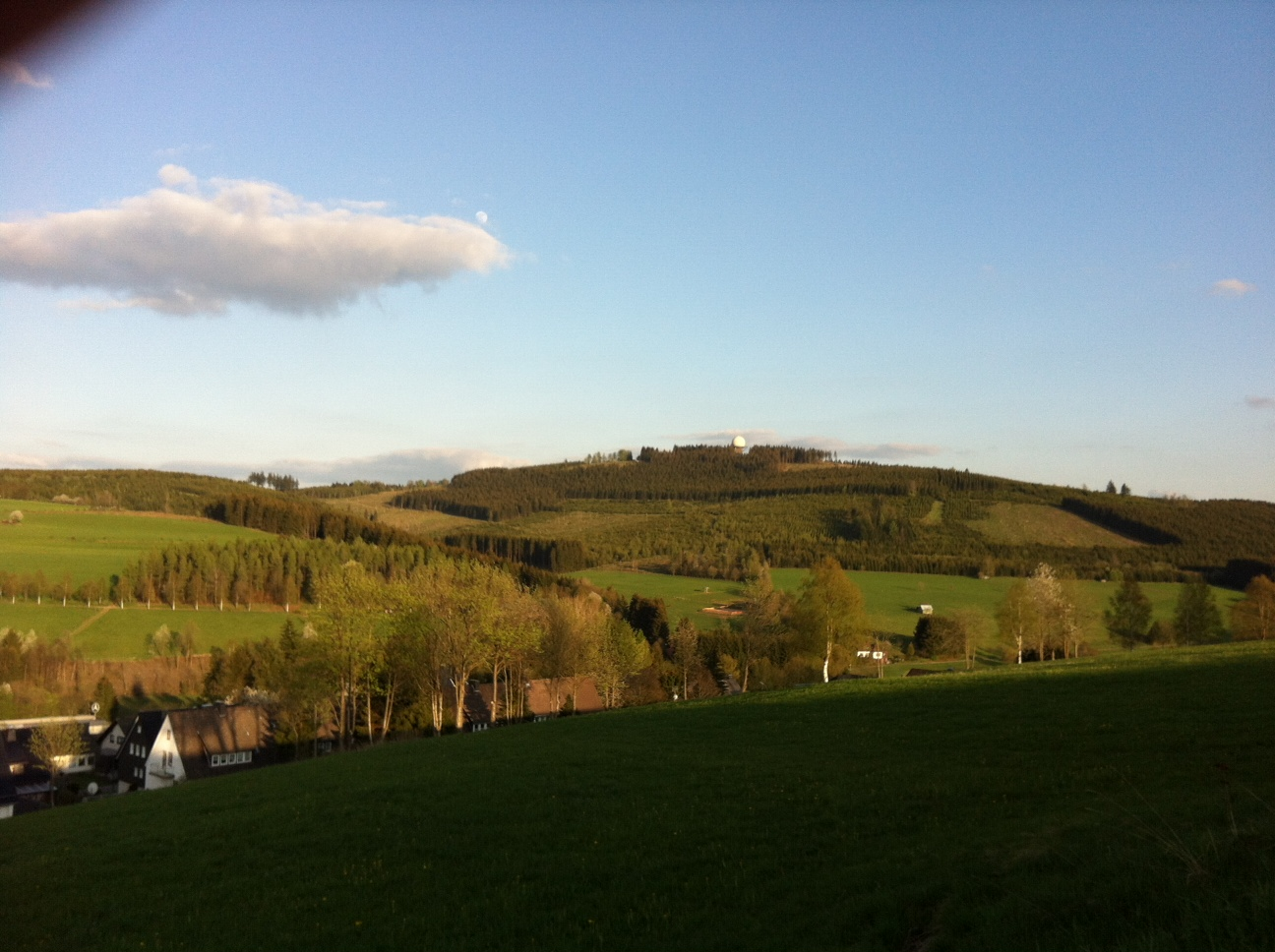 Hausberg von Erndtebrück und Standort der Luftraumüberwachung der Luftwaffe des Einsatzführungsbereiches 2.Gut erkennbar ist die Kuppel des Radargerätes.